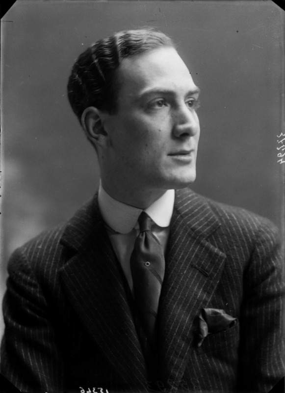 Luigi Cimara fotografato da Mario Nunes Vais